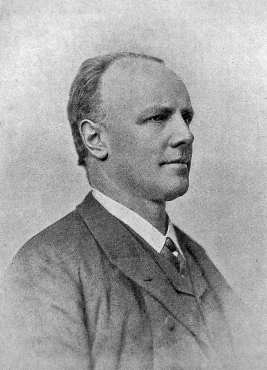 Emil Poulsen (1842-1911). Kongelig dansk skuespiller. Fremragende karakterskuespiller og sceneinstruktør, der spillede et meget omfattende repertoire.